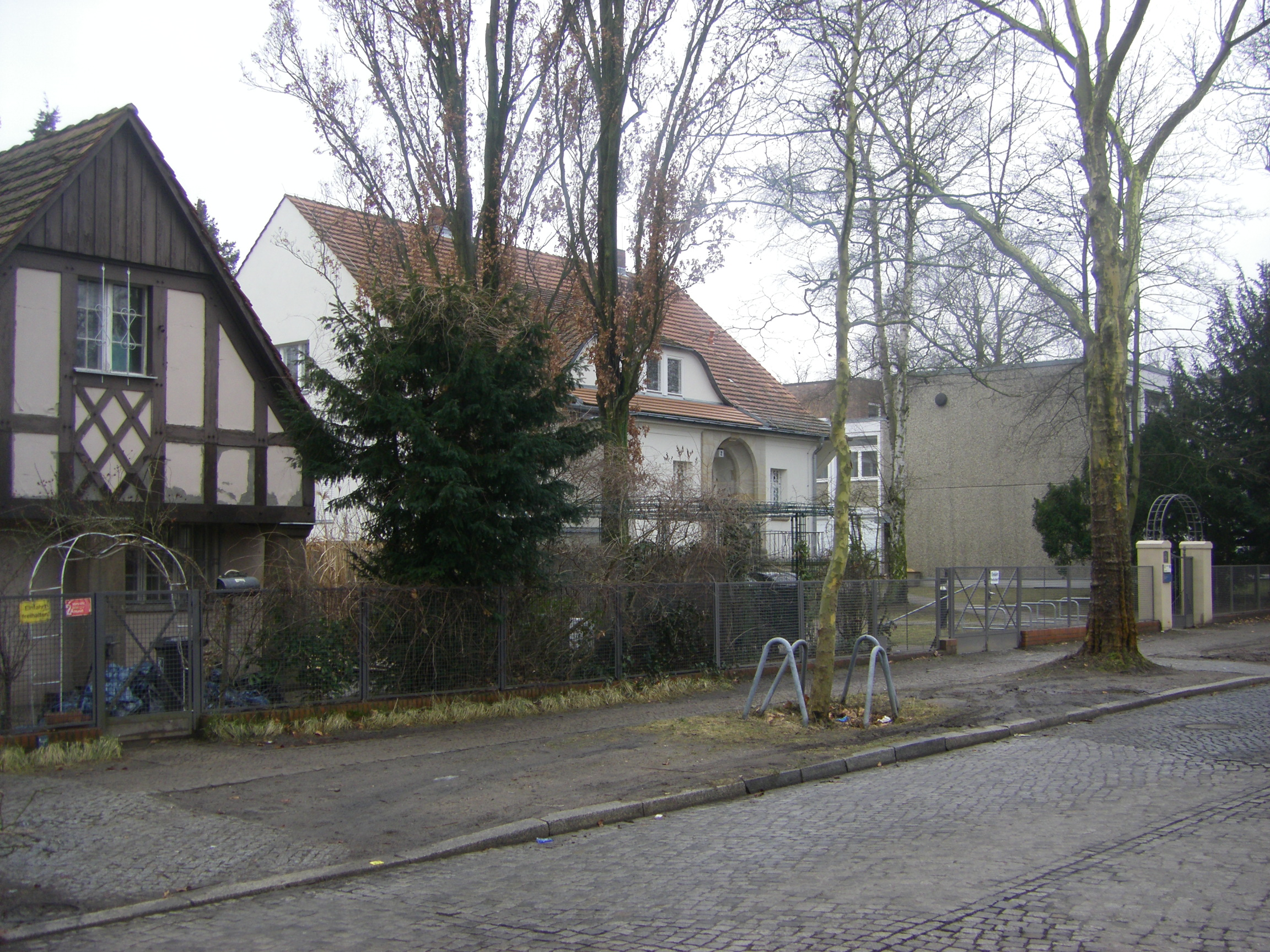 Berlin-Dahlem Arnimallee 2 Villa Blinzig